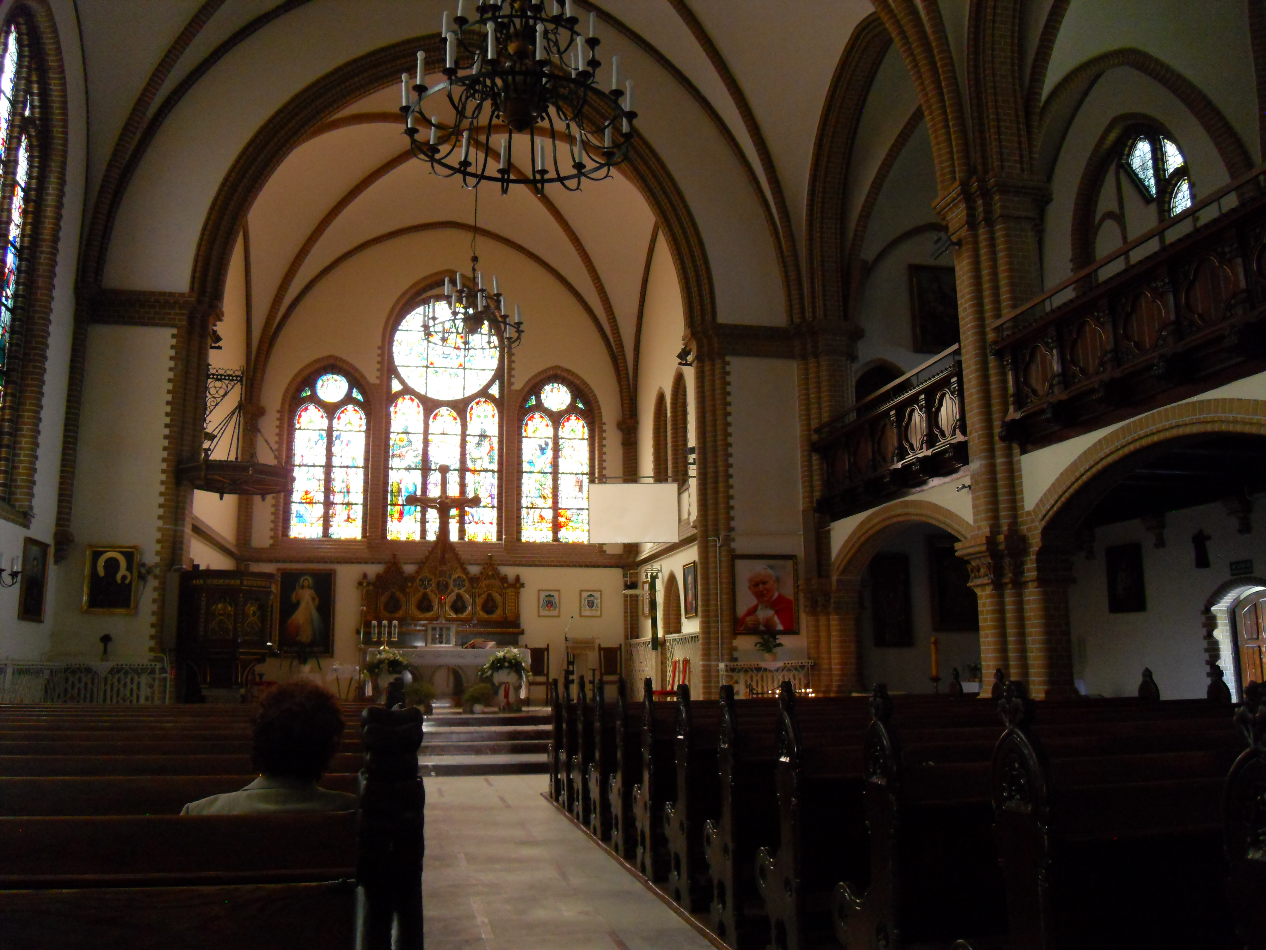 Gdańsk Wrzeszcz ul. Sobótki 20, kościół pw. Matki Odkupiciela (dawniej kościół garnizonowy świętych Apostołów Piotra i Pawła).